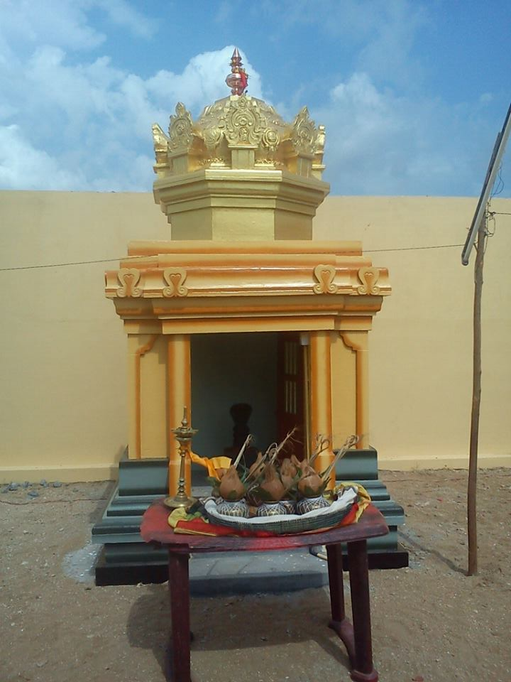 நாகதம்பிரான்